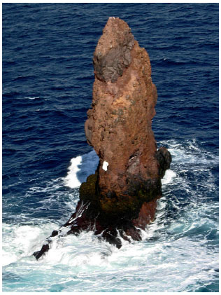 Vue d'ensemble de Sail Rock dans les Îles Shetland du Sud.